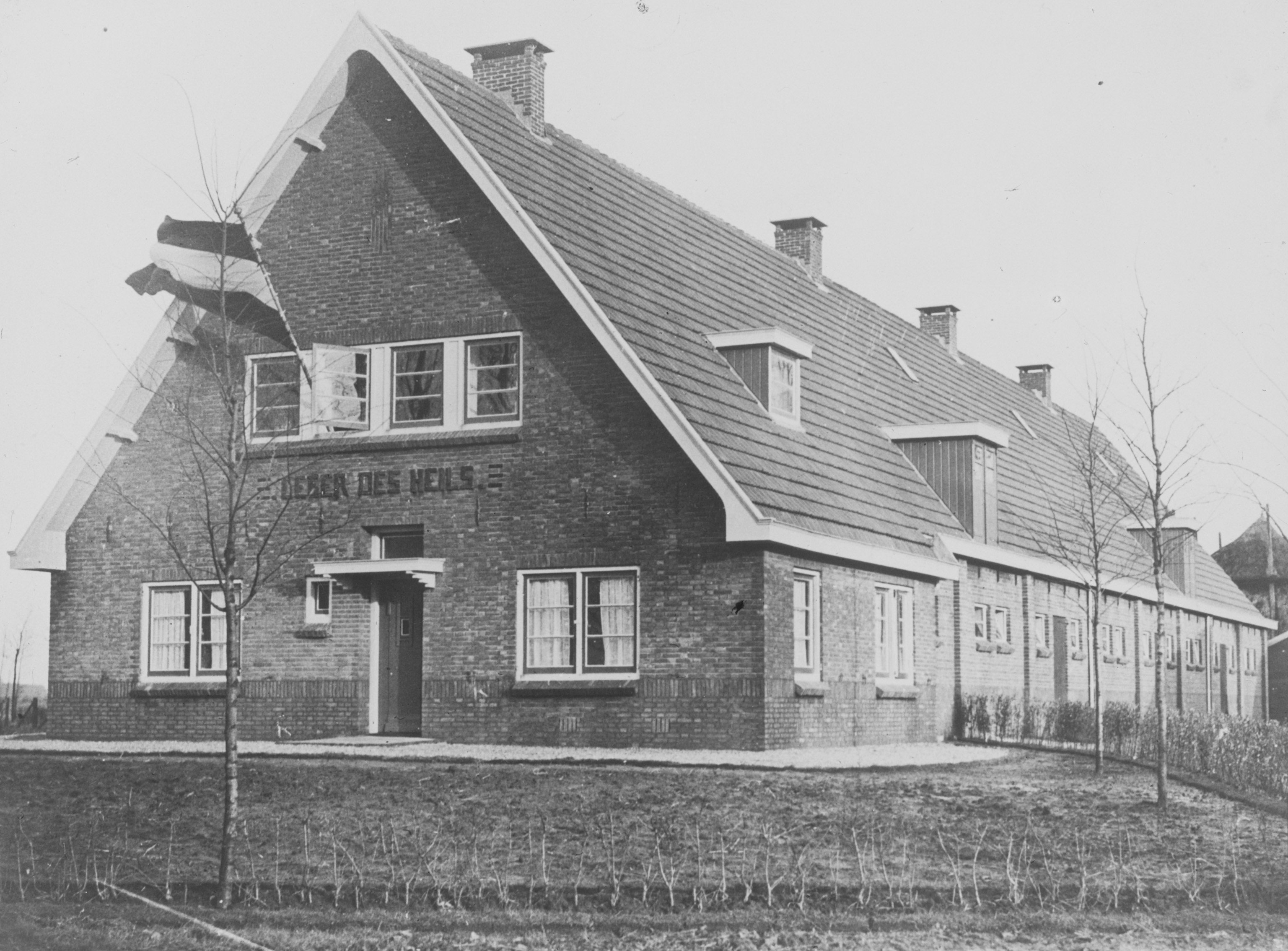 Collectie / Archief : Fotocollectie Nederlandse Heidemaatschappij Reportage / Serie : [ onbekend ] Beschrijving : moderne landbouwgebouwen, woningen Datum : ongedateerd Locatie : Gelderland, Lunteren Trefwoorden : moderne landbouwgebouwen, woningen Fotograaf : [onbekend] Auteursrechthebbende : Nationaal Archief Materiaalsoort : Lantaarnplaatje (glasdia) Nummer archiefinventaris : bekijk toegang 2.24.06.02 Bestanddeelnummer : 194-0555 Reacties Geplaatst door Maaike op 08 juni 2011 - 15:58. Terrein landkolonie Groot Batelaar van het Leger des Heils met de zojuist geopende modelboerderij op 11 december 1929.